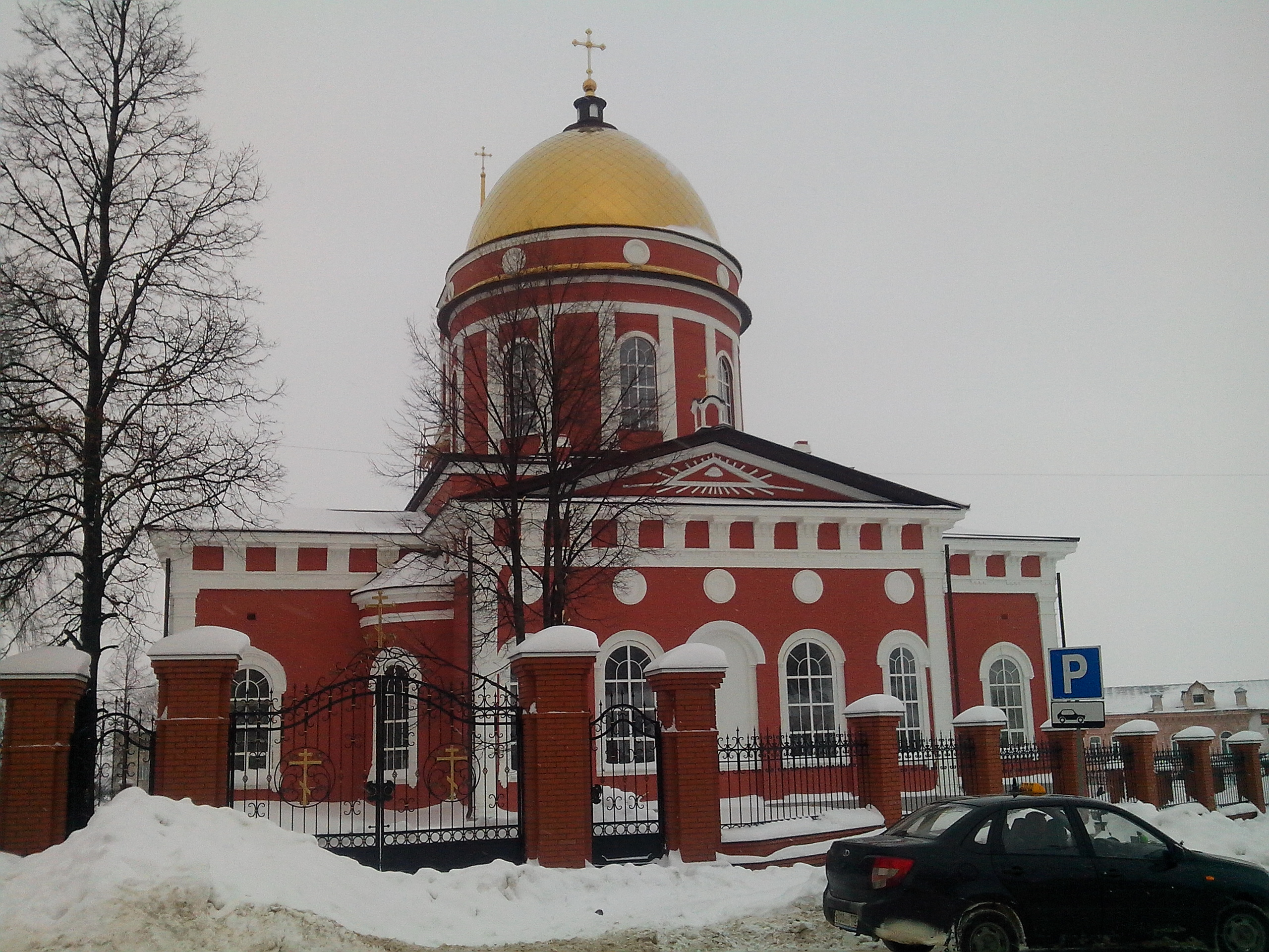 Свято-троицкий собор (Республика Башкортостан, Бирск, октябрьская площадь)